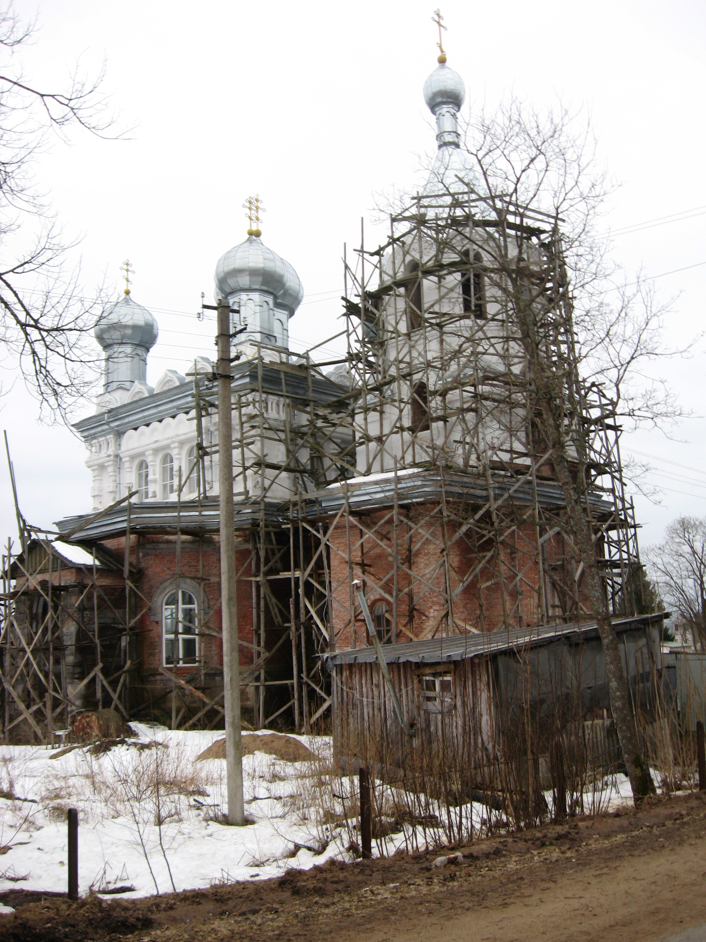 Церковь Иоанна Богослова в посёлке Ивановское Кингисеппского района Ленинградской области в середине апреля 2013 года.